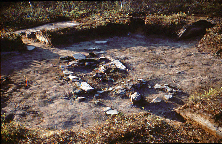 Härd i stalotomt vid Mavas, Arjeplog, 19770618.